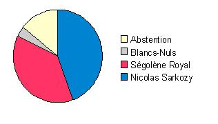 Proportions des choix des inscrits bas-normands au 2èmetour des Présidentielles de 2007